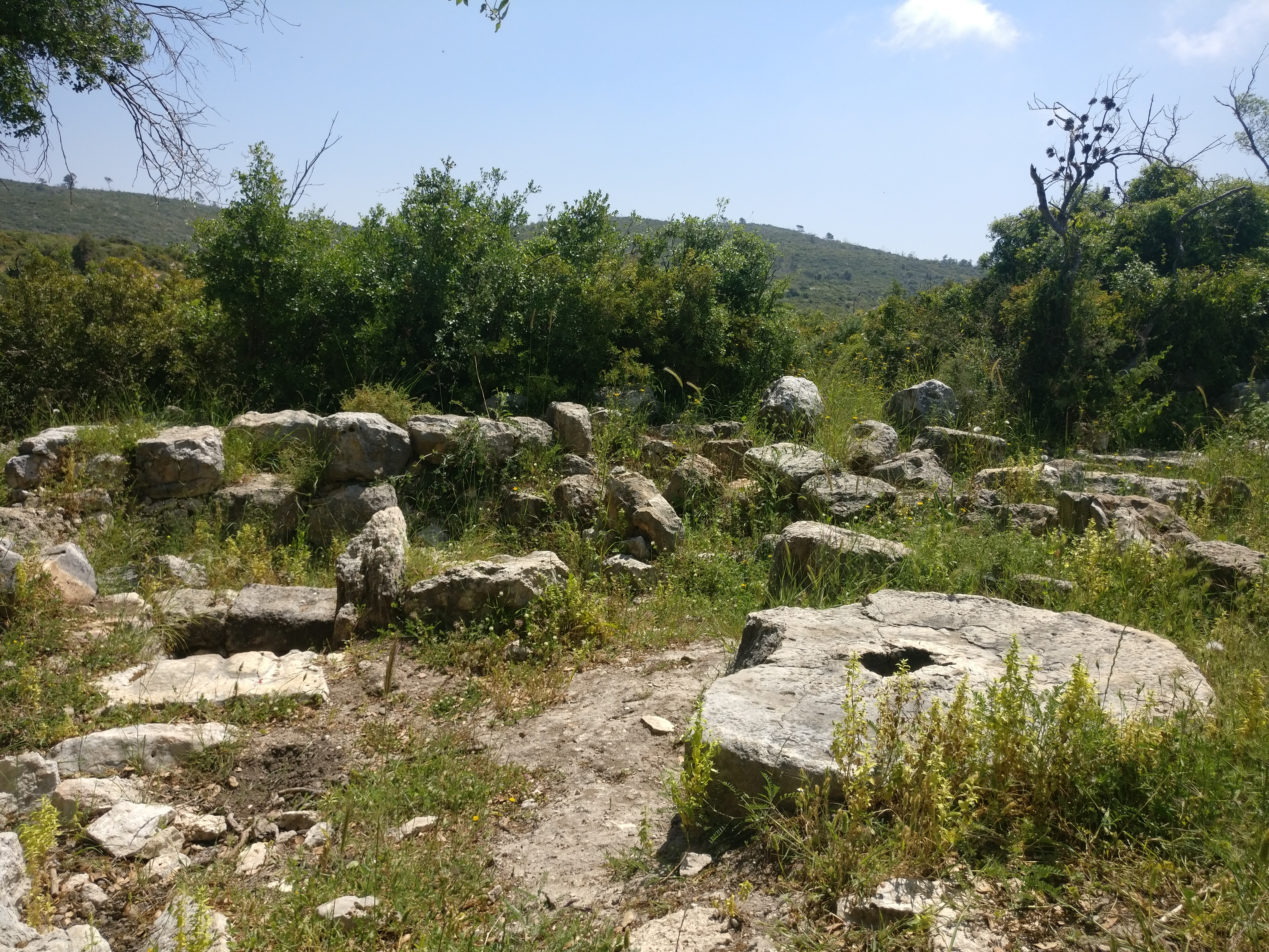 שרידי בית בד בחורבת רקית